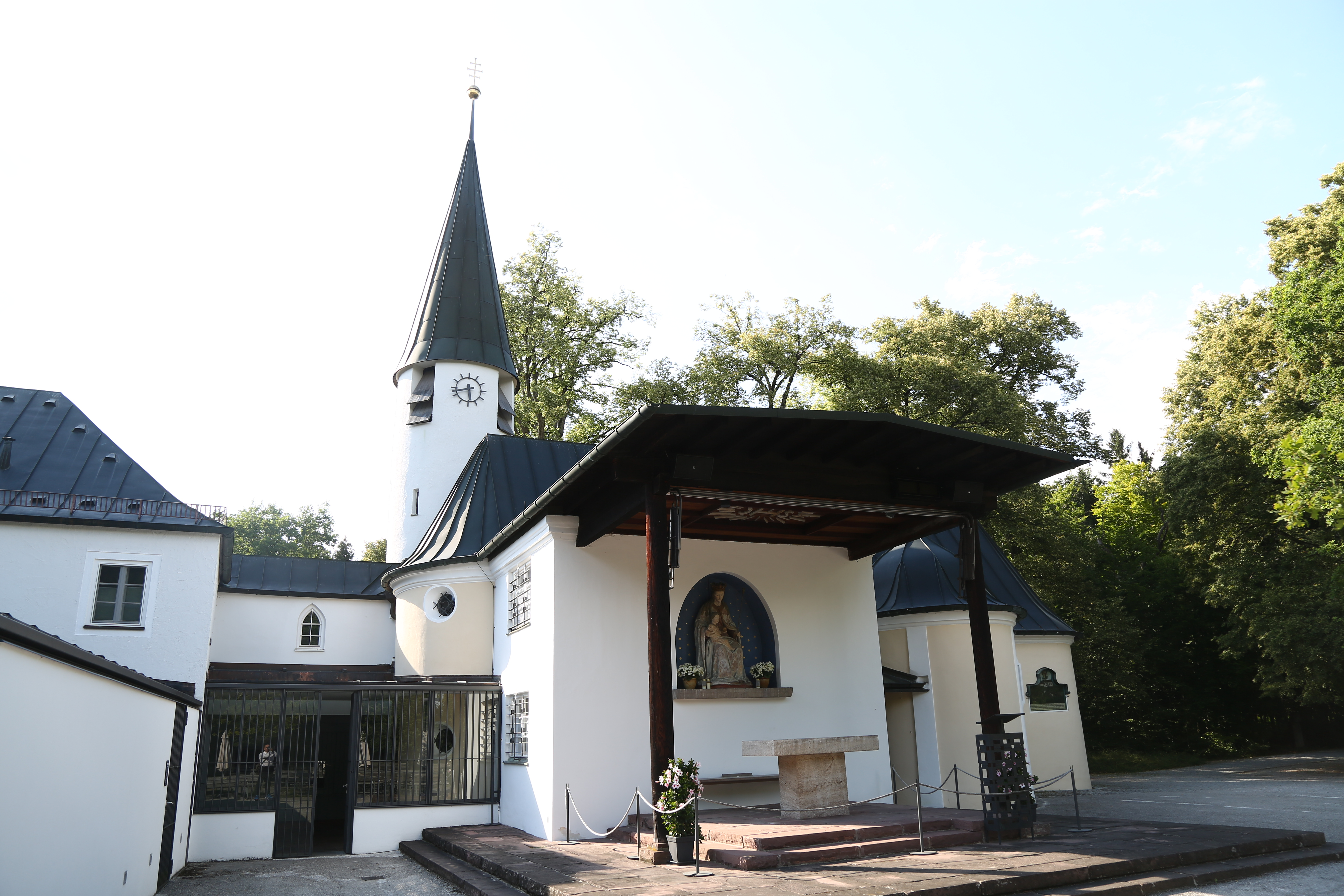 Maria Eich, bei Planegg, ist eine Wallfahrtskirche und ein Augustiner-Kloster